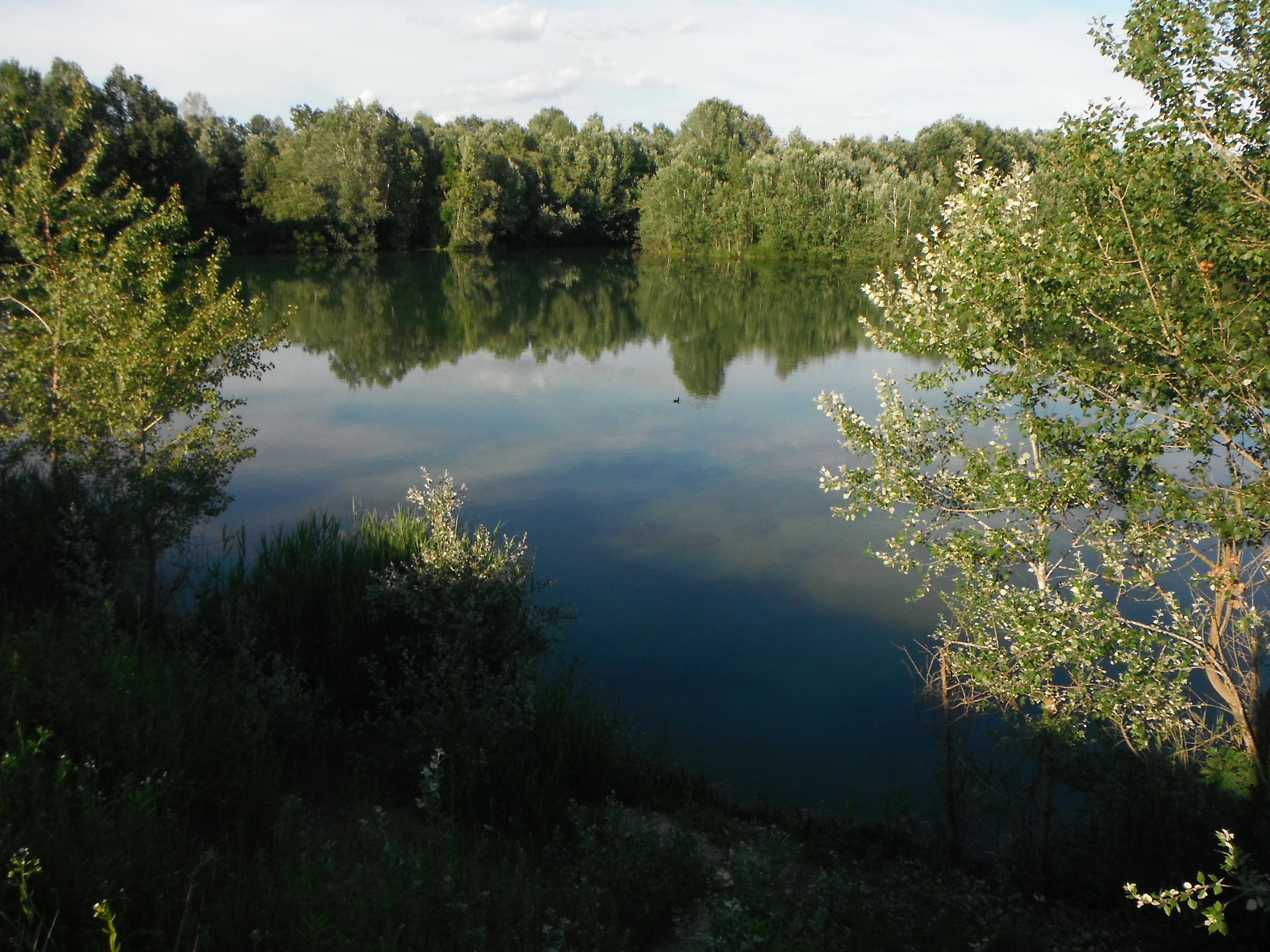 Stagno nei pressi del fiume Tanaro nel comune di Revigliasco d'Asti (Italia).